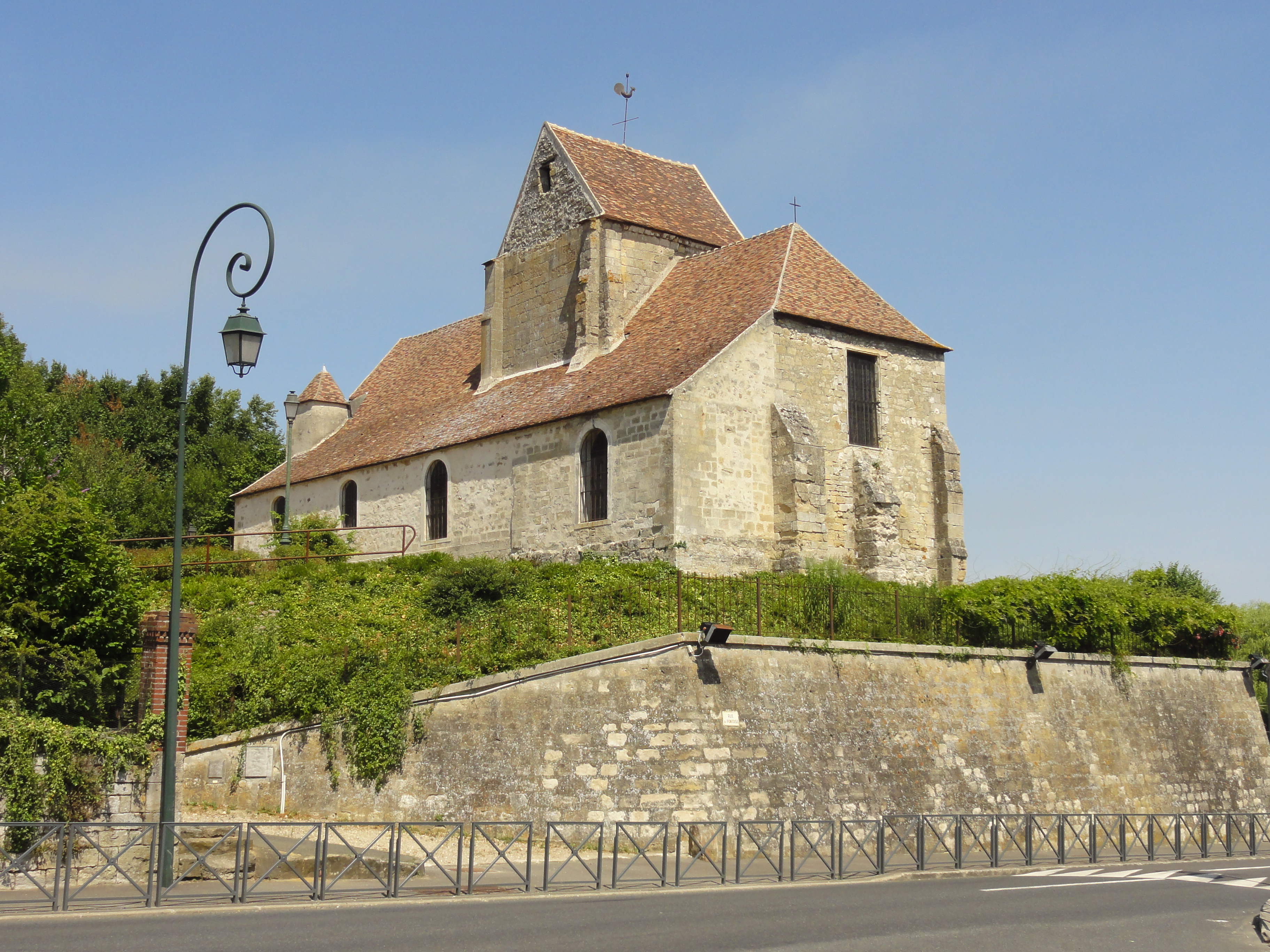 Vue depuis le sud-est.